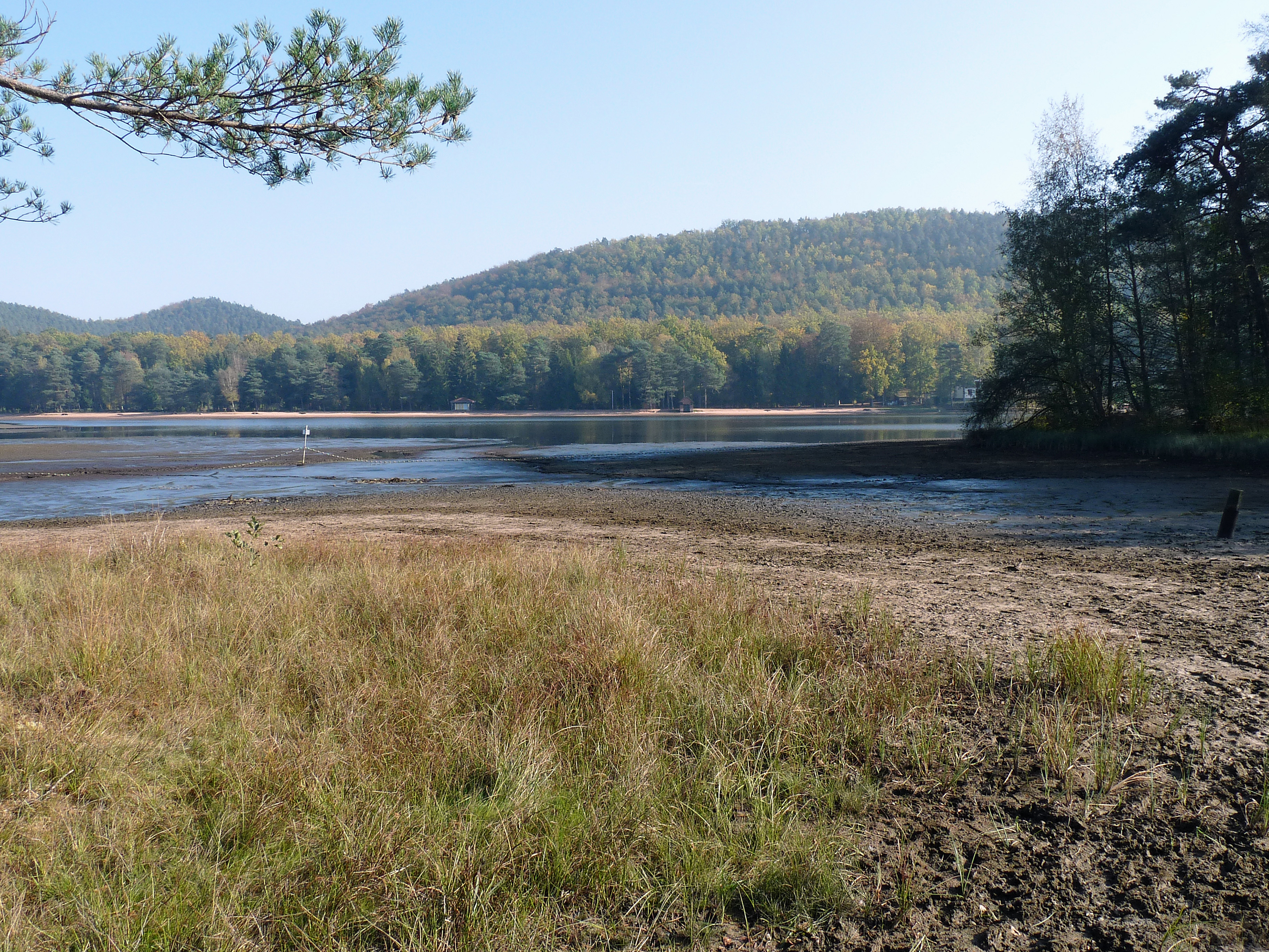 Étang de Hanau (Moselle)